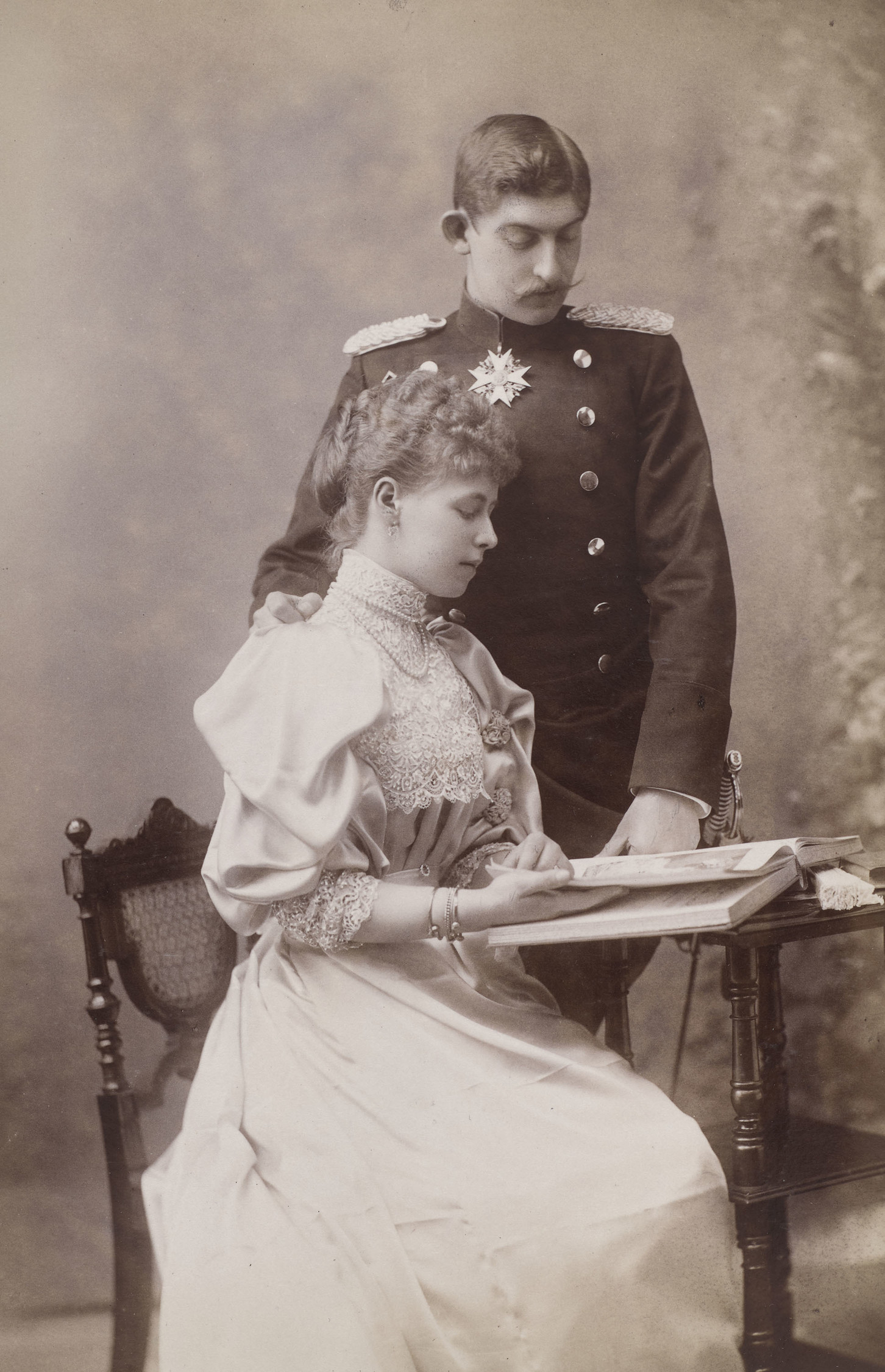 Imagine din 1893 reprezentând cuplul princiar român Ferdinand şi Maria Reproducere după o carte poştală de epocă